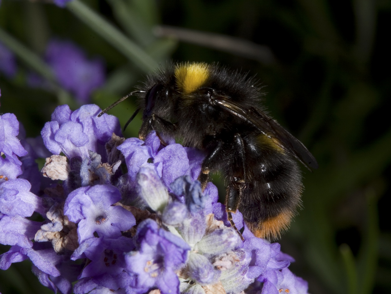 Bombus pratorum